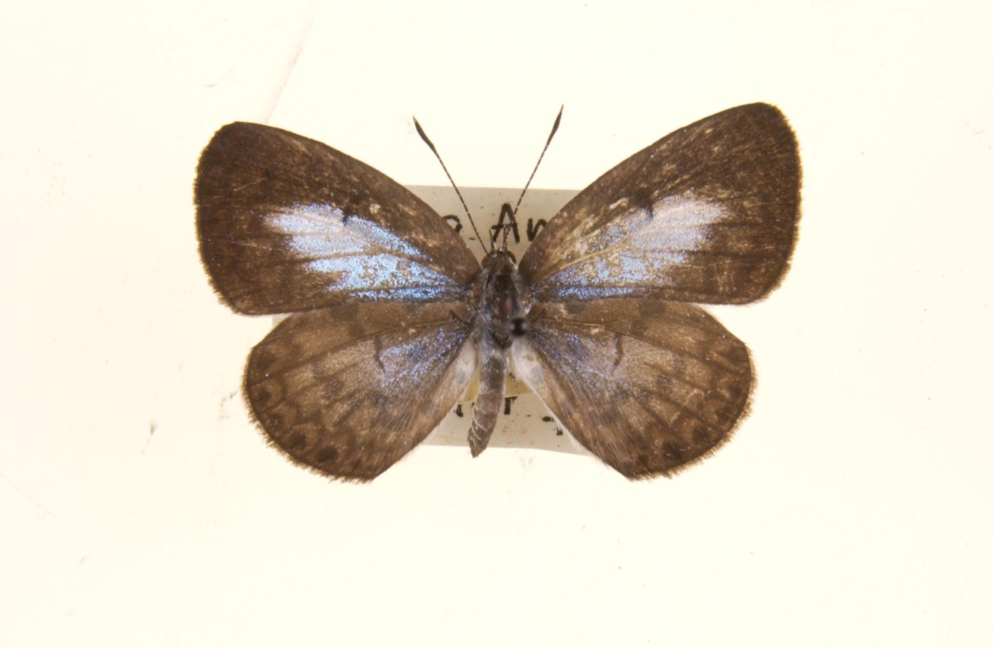 puspa female